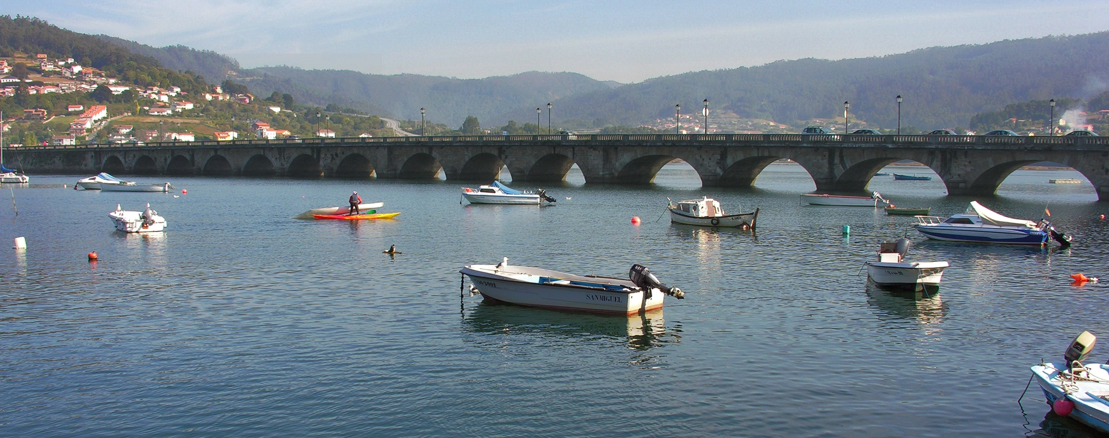 Ponte sobre o río Eume, entre o concello de Cabanas (dereita) e o de Pontedeume. Galiza